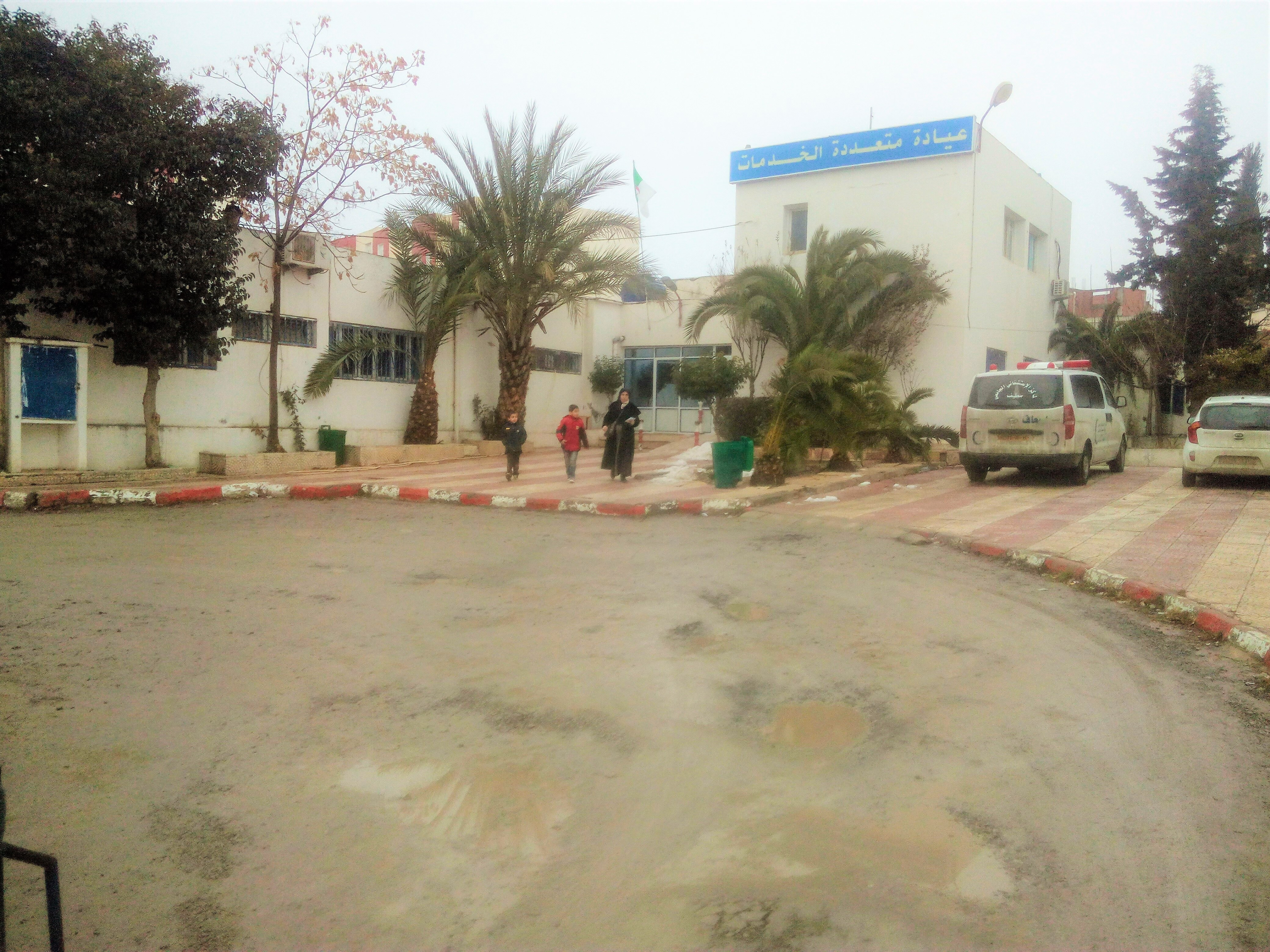 صورة من ساحة العيادة المتعددة الخدمات